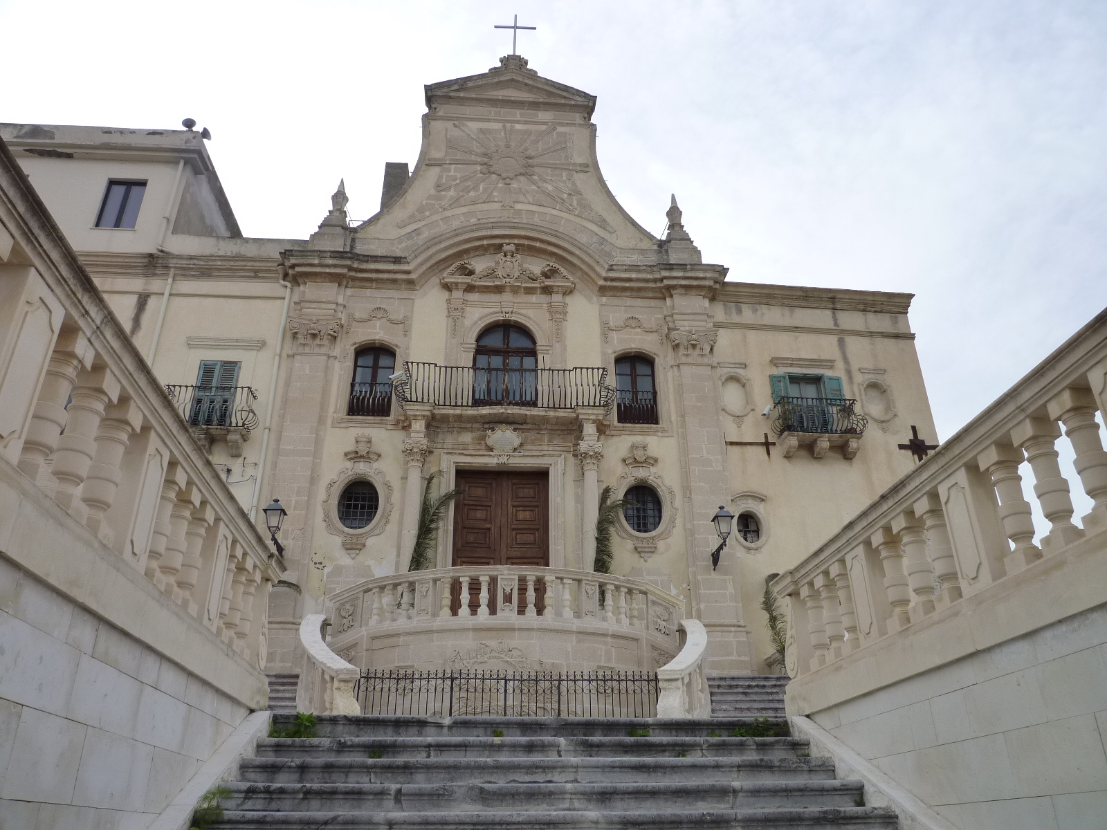 Die Chiesa S. Maria Maggiore in Milazzo, Sizilien.